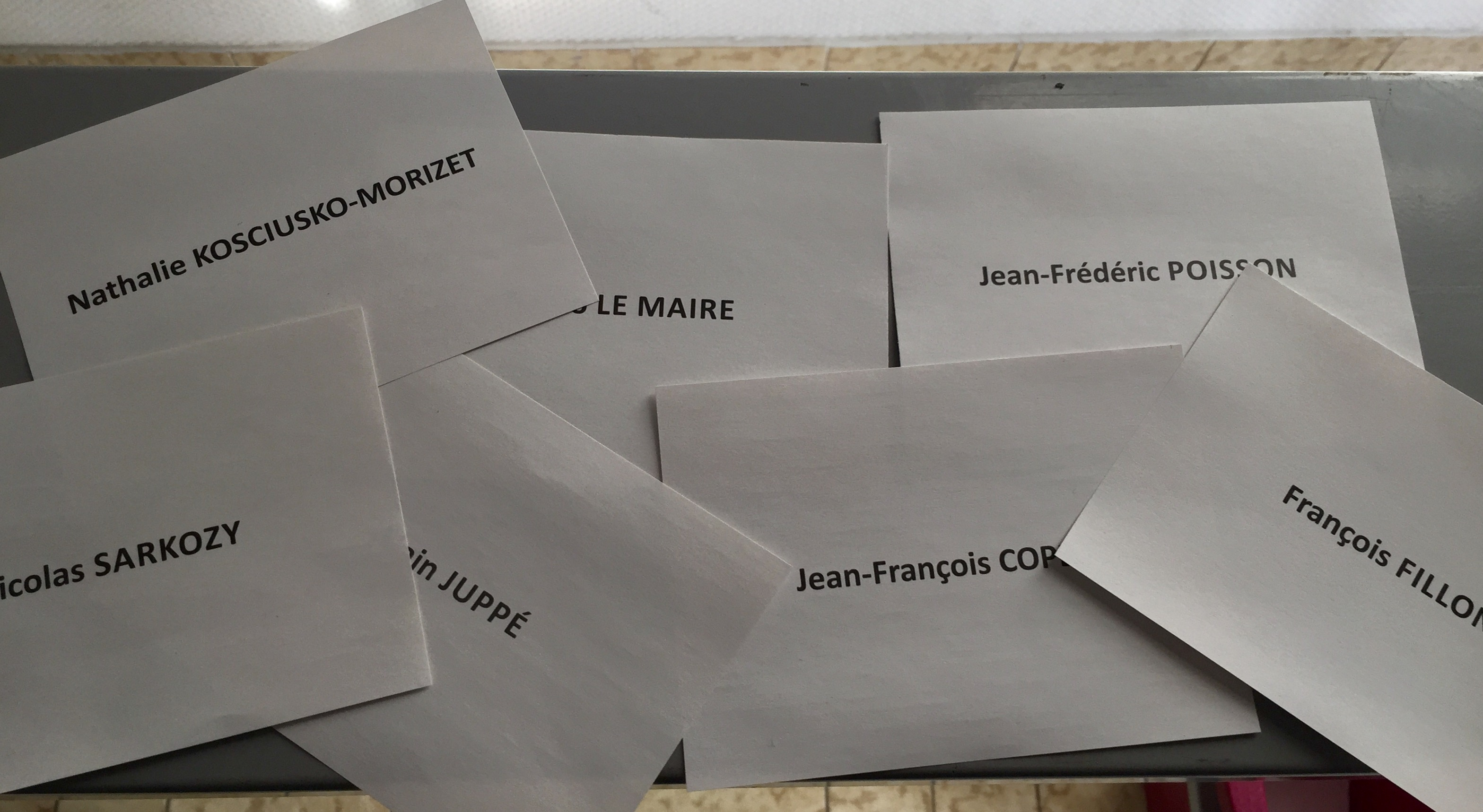 Bulletins de vote du premier tour de la primaire de la droite et du centre en 2016 dans l'isoloir à Tramoyes.